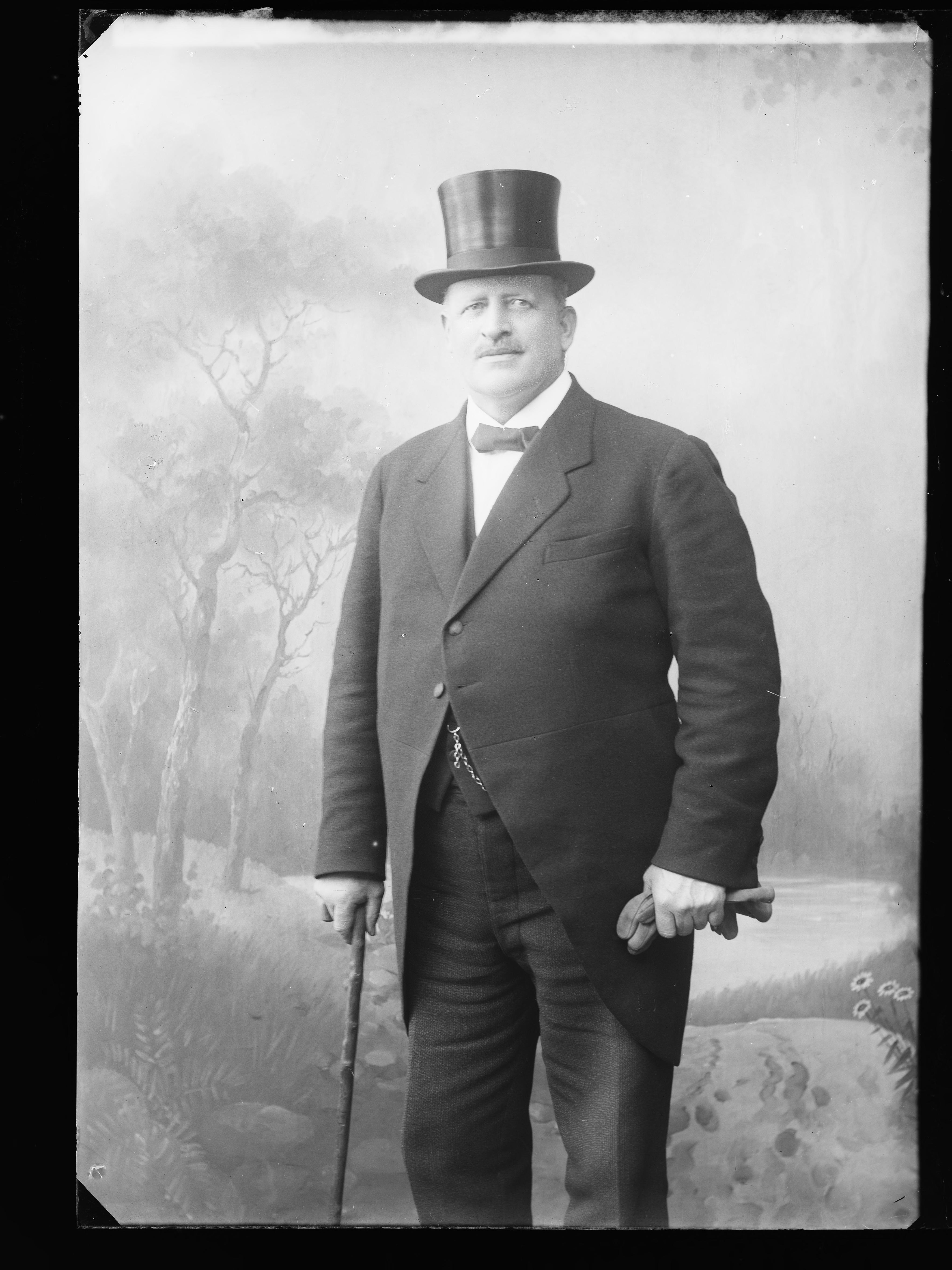 Bildet er hentet fra Nasjonalbibliotekets bildesamling. Anmerkninger til bildet var: Påskrift arkivark: Cirkusdirektør Norbeck Eldste arkivnummer: 192 Oslo, Oslo